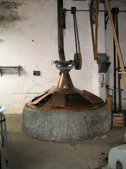 kupferner Sudkessel der historischen Cantillon-Brauerei in Brüssel. Oben charakteristische Transmissionsriemen zur Kraftübertragung. Siehe auch:de:Getreidespeicher